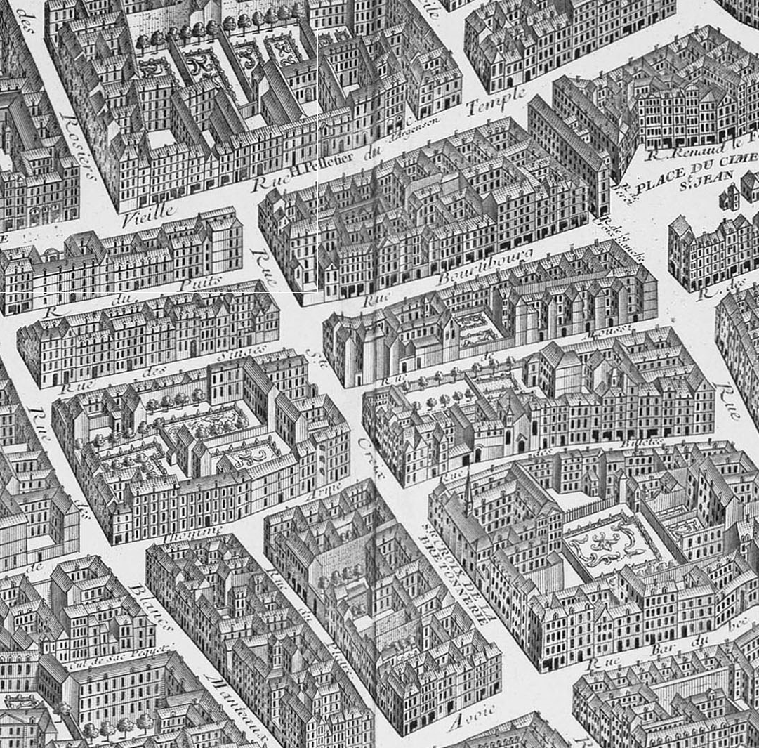 Rue Sainte-Croix-de-la-Bretonnerie sur le plan de Turgot de la ville de Paris, réalisé entre 1734 et 1739